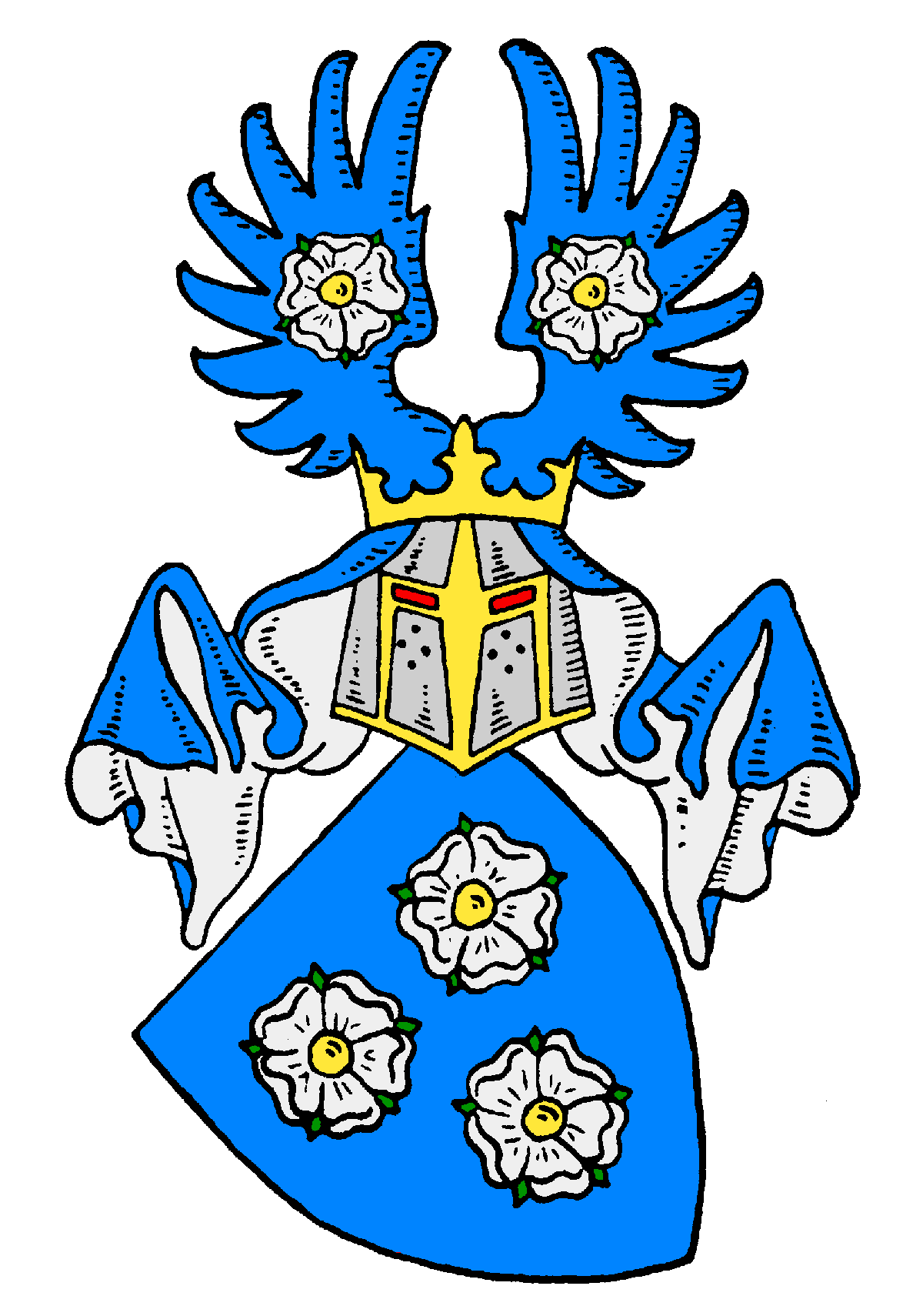 Stammwappen der von Rahden